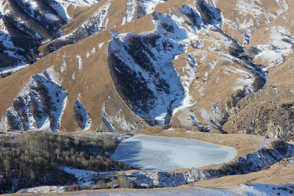 Галанчожское озеро. Чечня